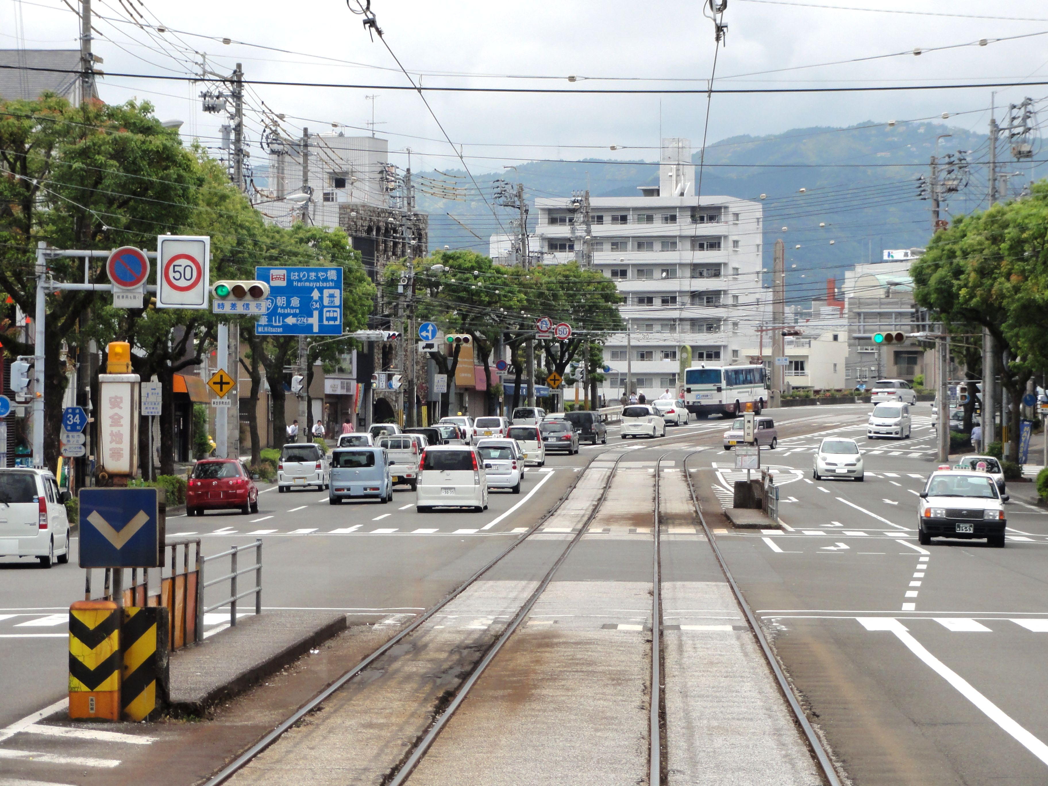 土佐電気鉄道・梅の辻電停